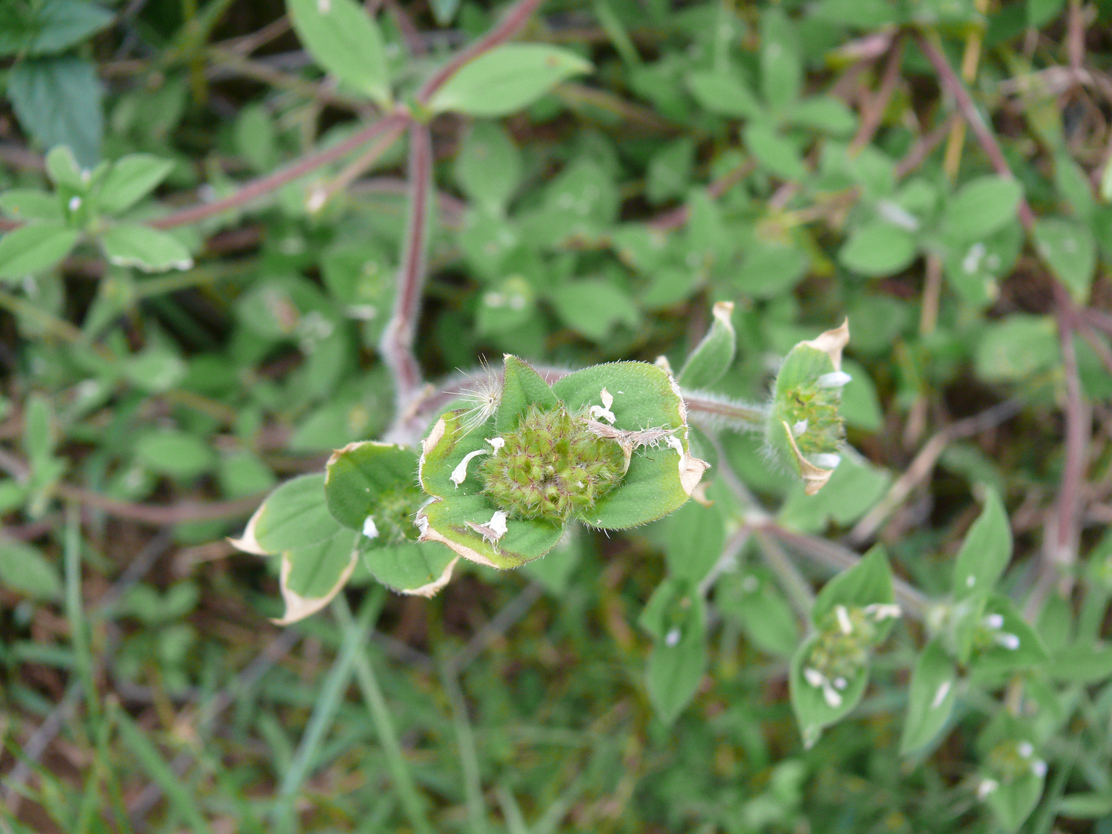 Richardia brasiliensis